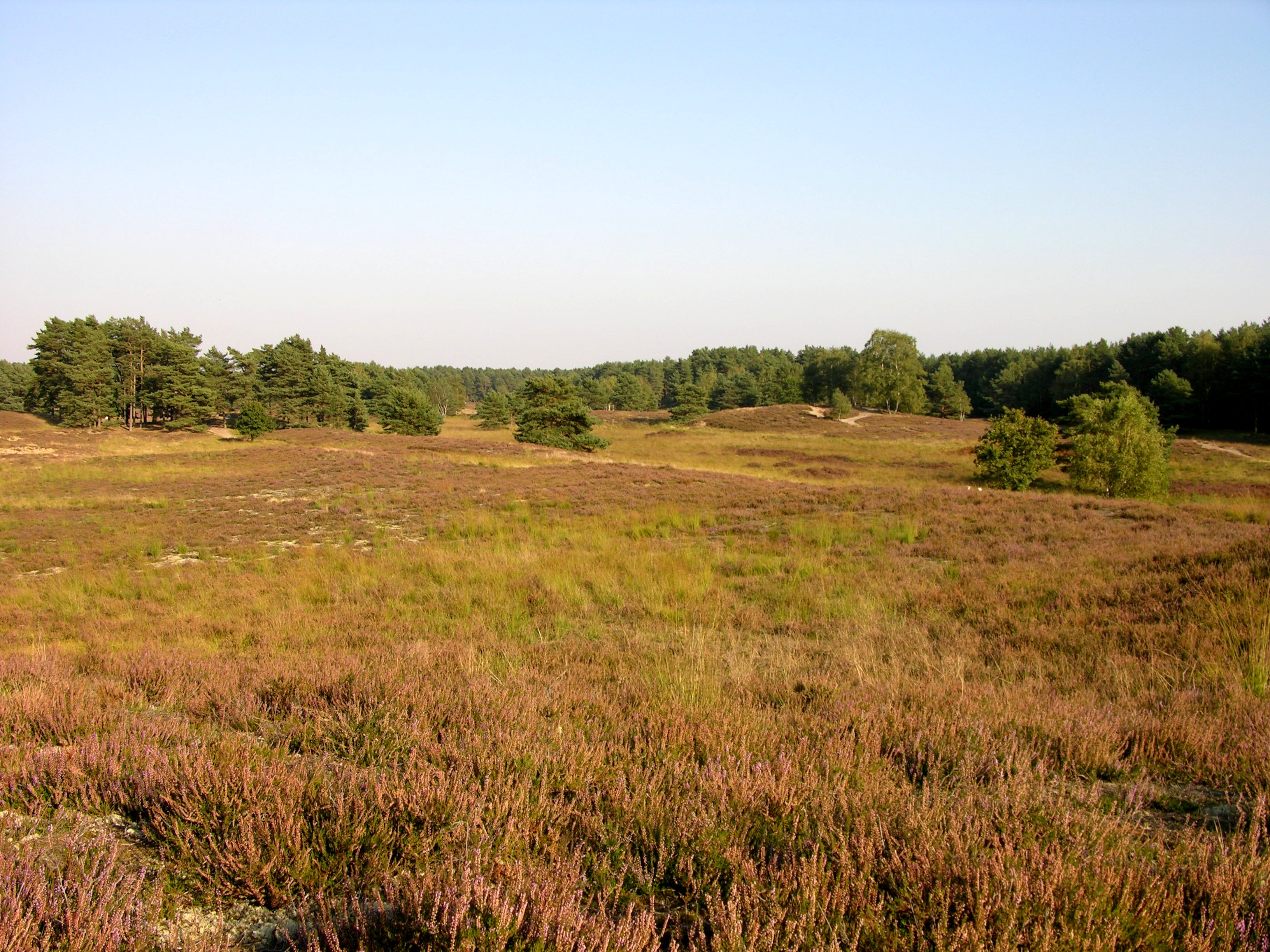 Gifhorner Schweiz - Eine wunderbare Heidelandschaft zwischen Gifhorn und Gifhorn-Winkel